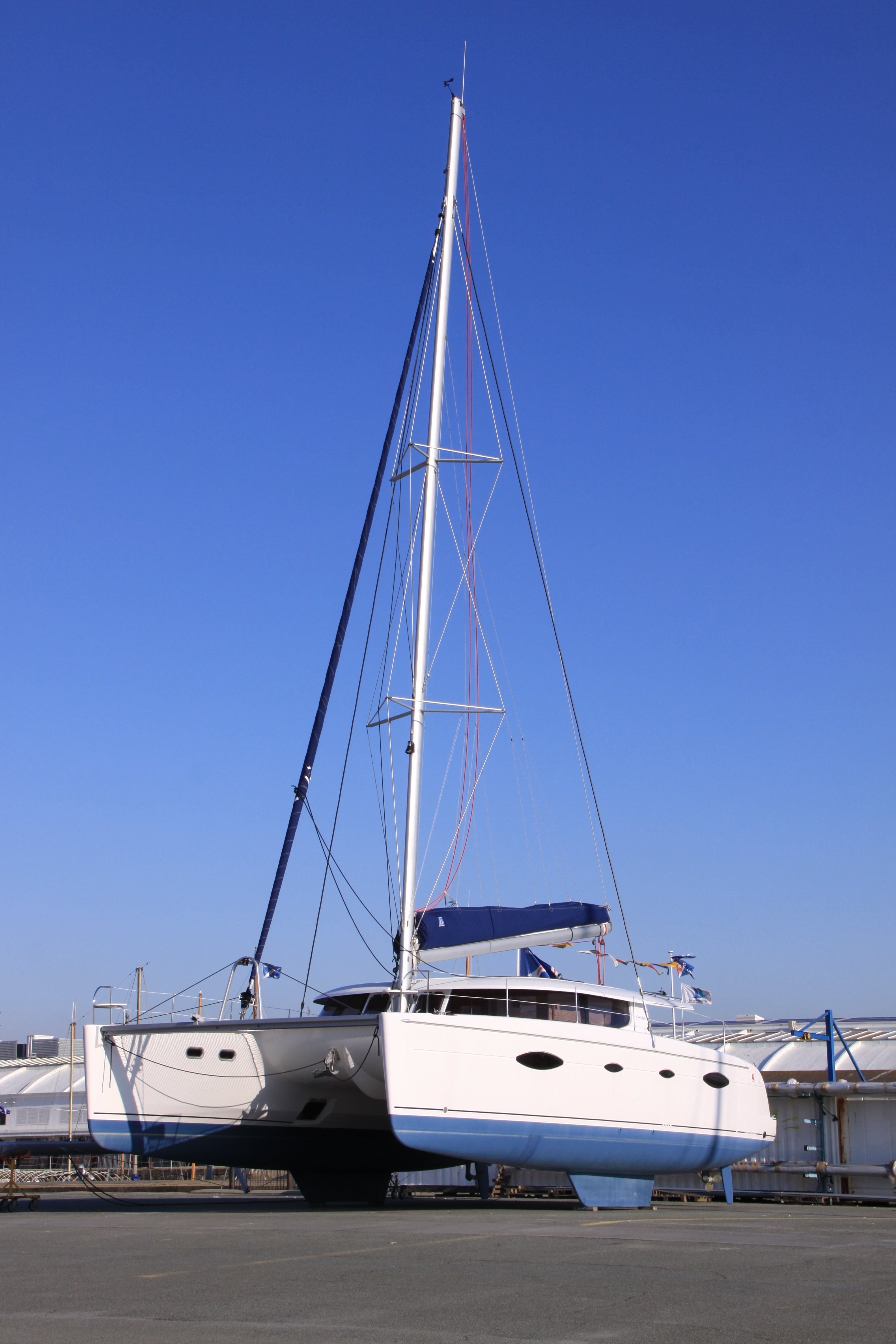 Un catamaran modèle Salina 48 sur ses quilles, sur le plateau nautique de la Ville en Bois à La Rochelle. Ce modèle de bateau de plaisance de série a été lancé en 2007. Il mesure 14,3 mètres de longueur et 7,7 mètres de largeur. Voilure au près: 136 m2. Constructeur: Fountaine Pajot SA. La Rochelle, Charente Maritime, France.